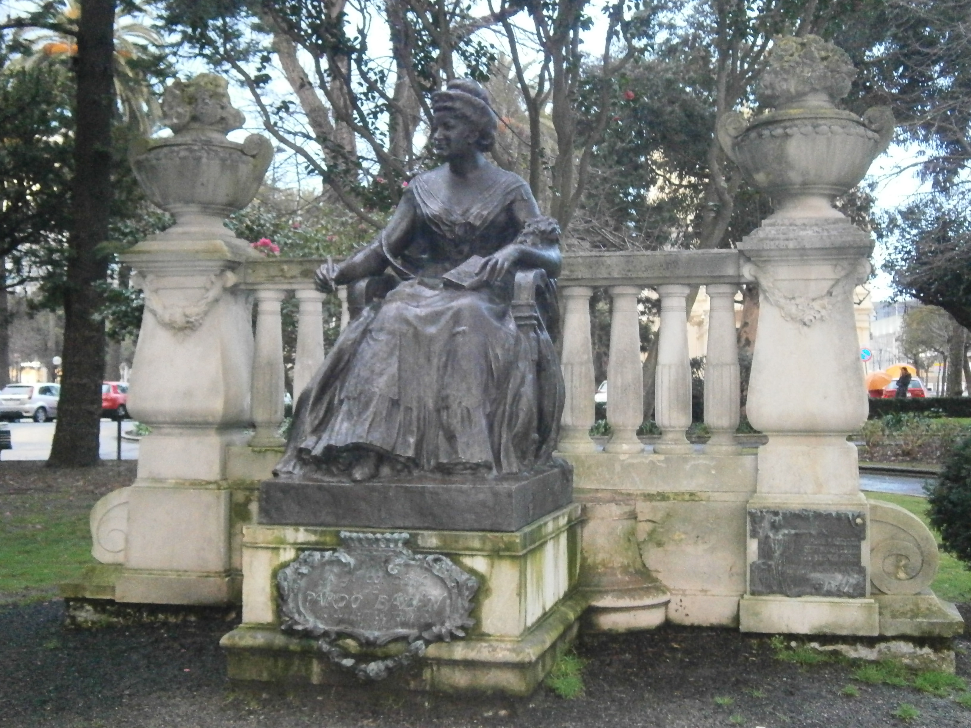 Monumento a Emilia Pardo Bazán nos Xardíns de Méndez Núñez (A Coruña)